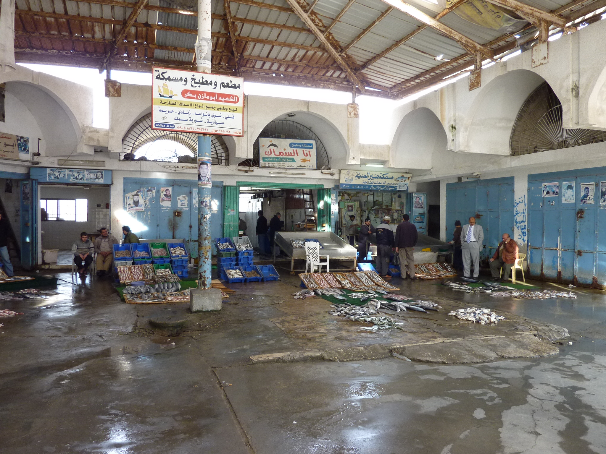 Fish market